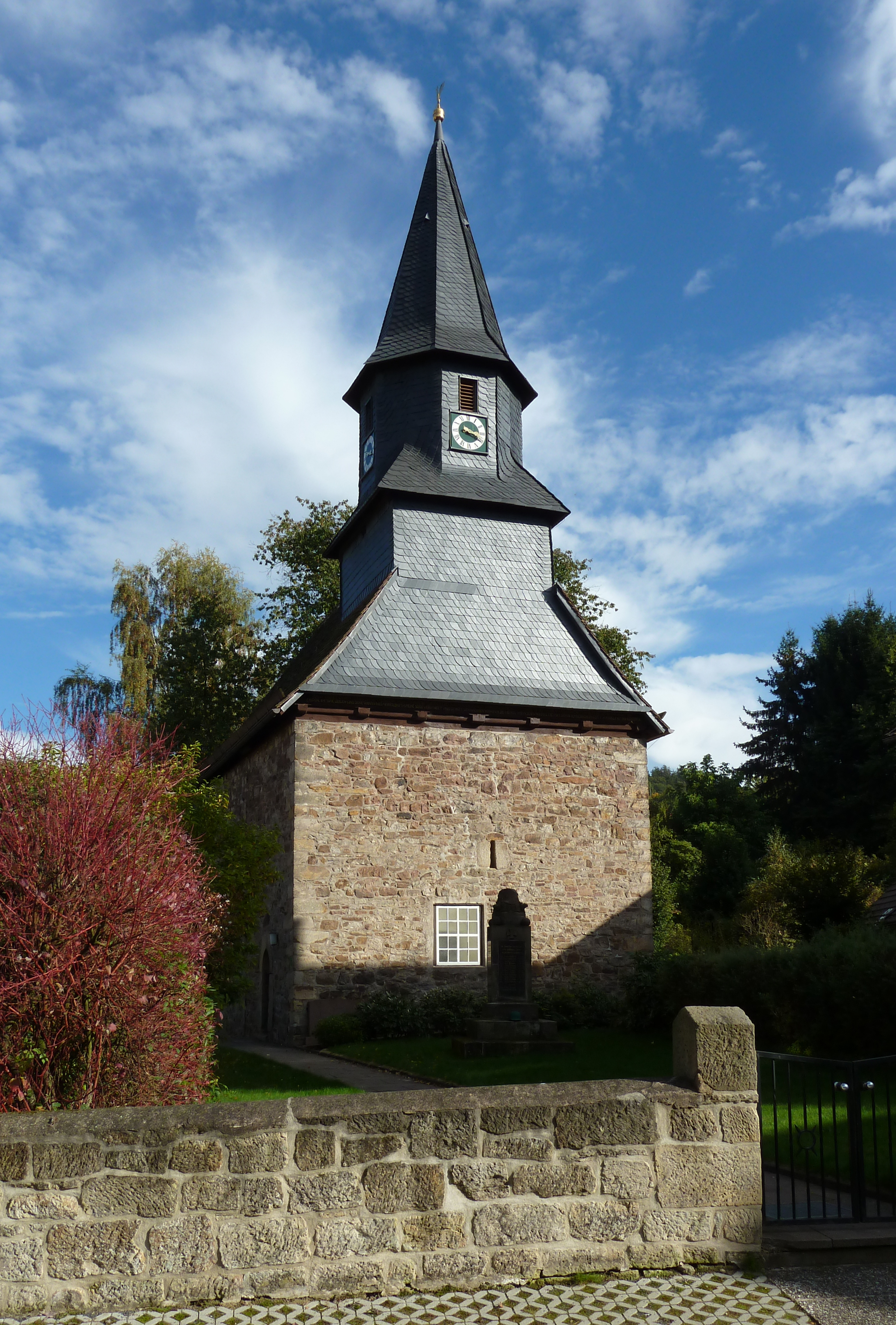 Ev.-luth. Kirche in Fürstenhagen, Stadt Uslar, Niedersachsen. Fast quadratischer Wehrturm des 13. Jahrhunderts (vorne) mit Fachwerkerweiterung nach Osten 1563, heutige Gestalt mit Turm nach dem Dreißgjährigen Krieg.